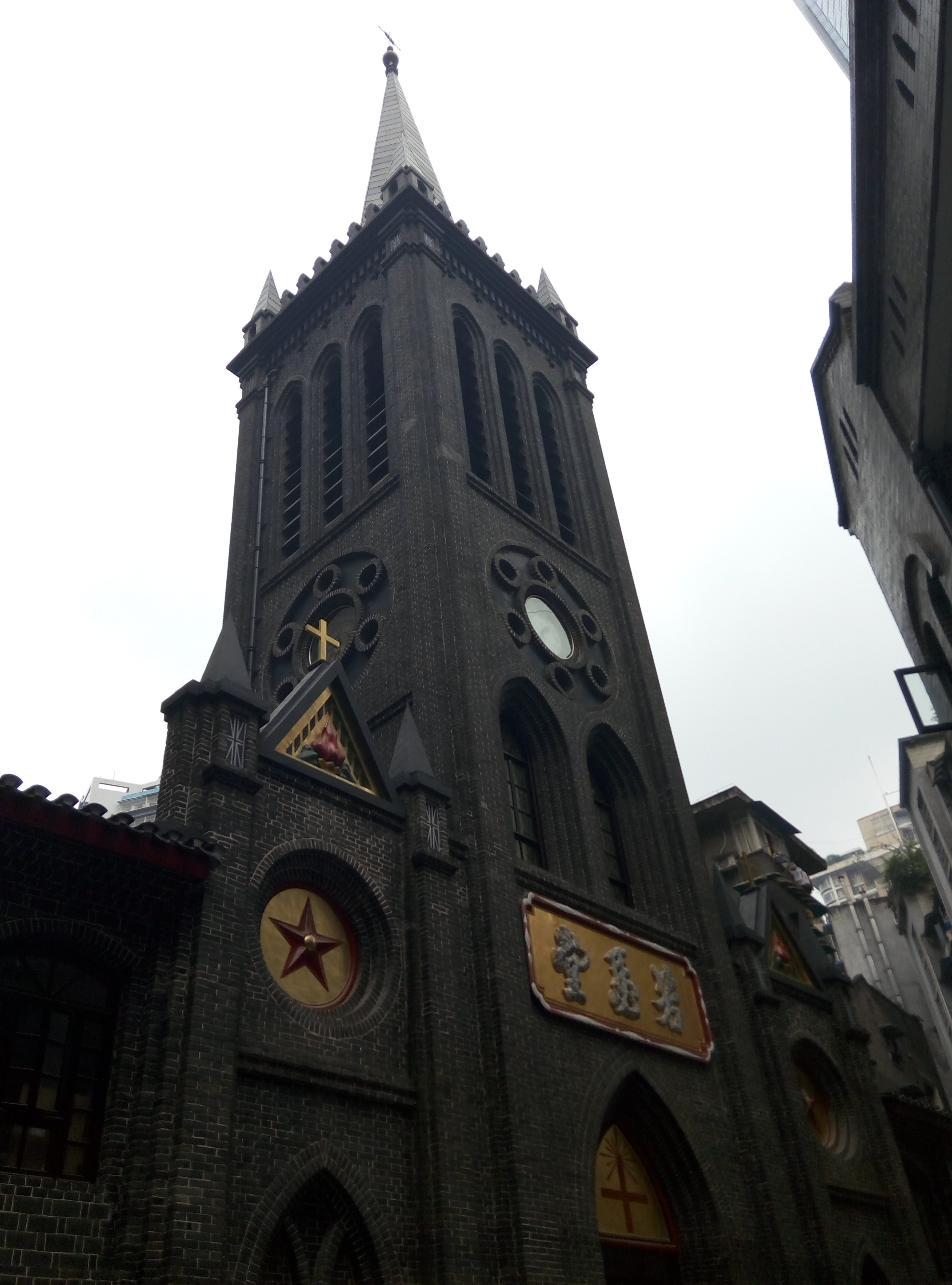 粵語: 重慶渝中嘅若瑟堂，2015年10月5號影低。